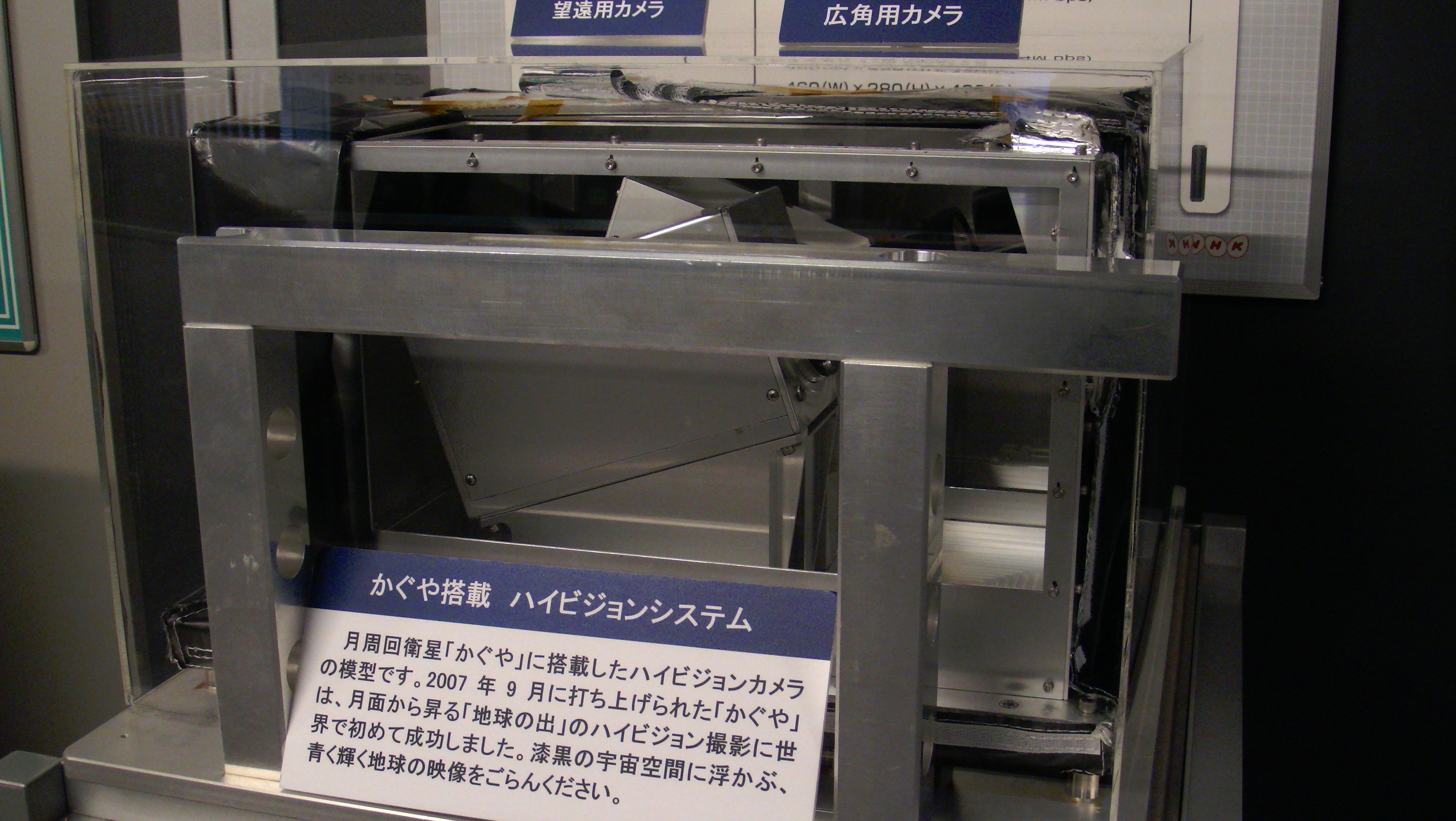 月周回衛星「かぐや(SELENE)」に搭載されたハイビジョン撮影システム(replica)。NHK放送博物館所蔵